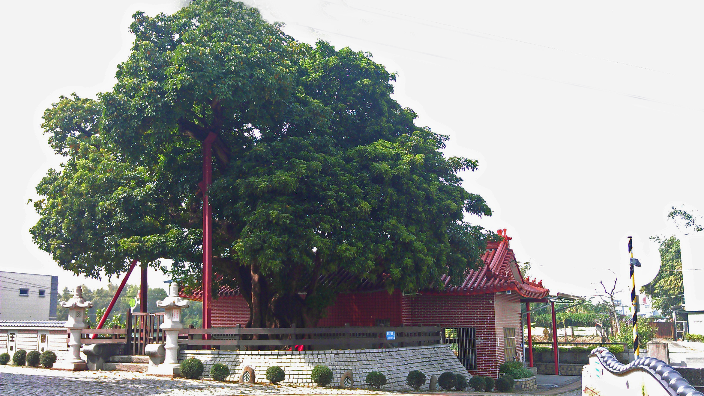 中文（台灣）: 大里區樹王公